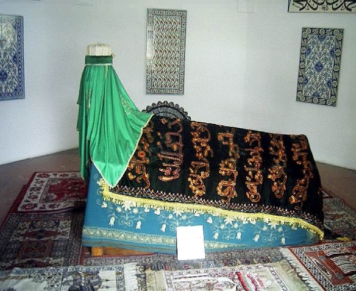 Grab von Gül Baba, Budapest